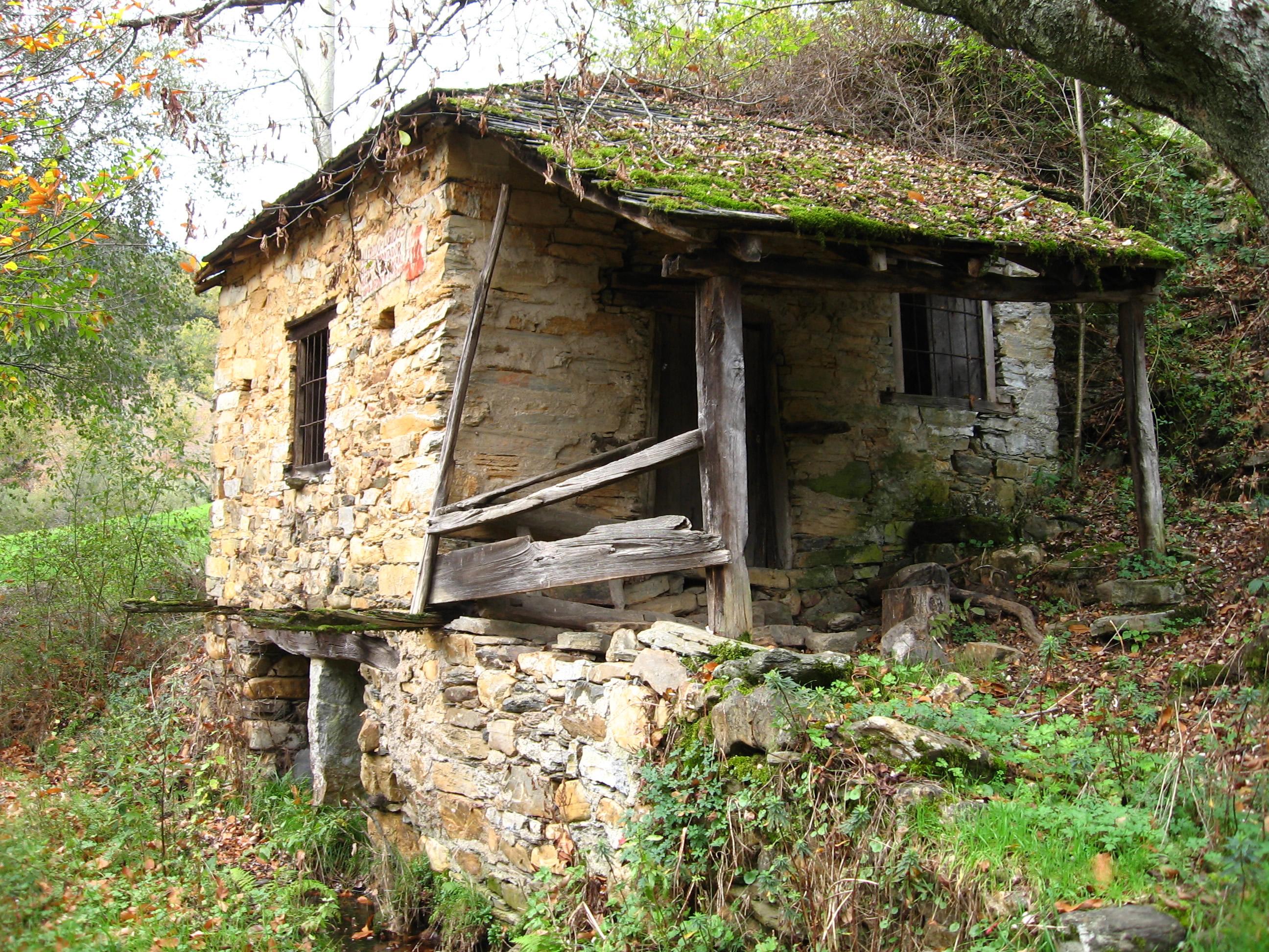 Antiguo molino en Oulego.